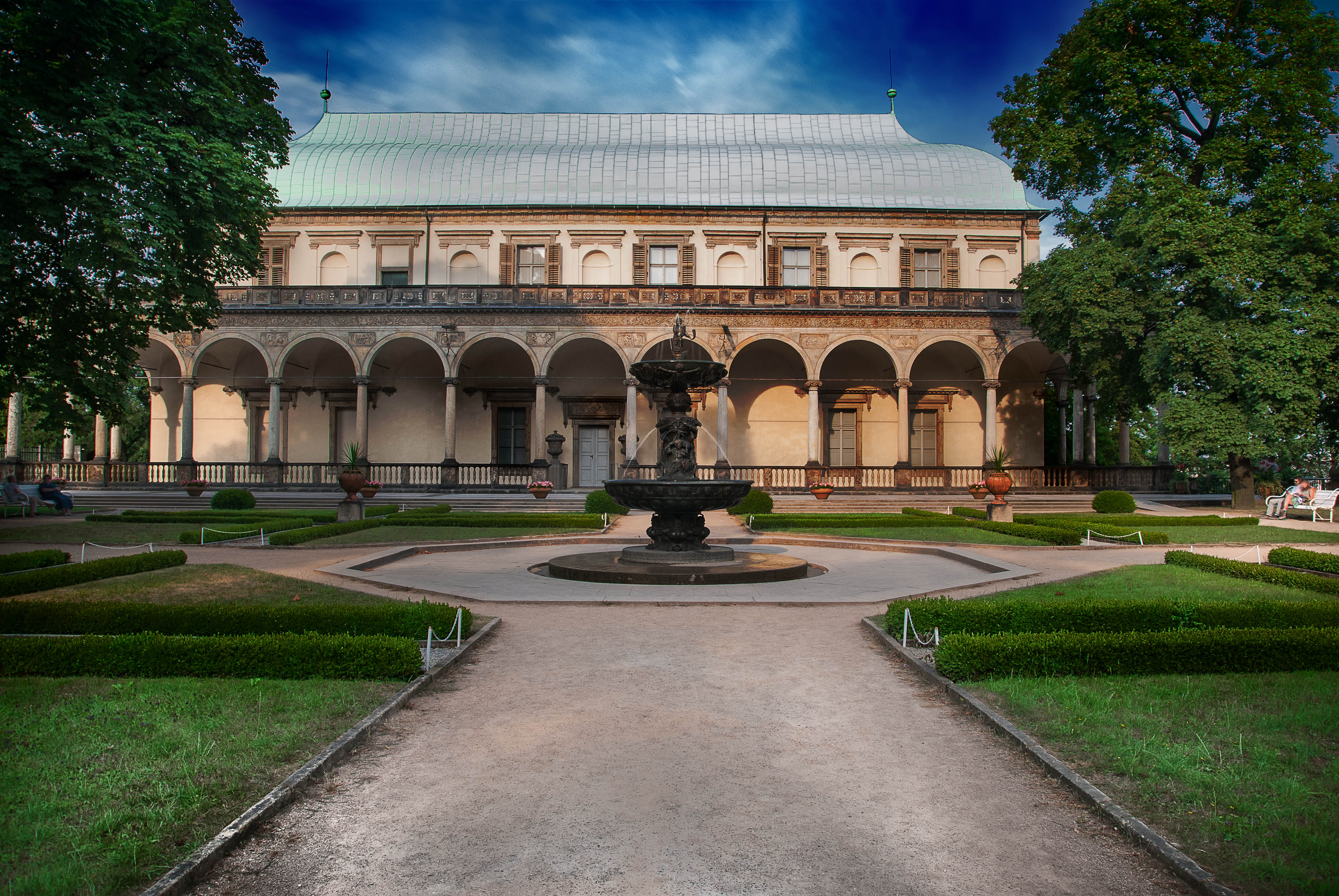 Pražský hrad, Letohrádek královny Anny